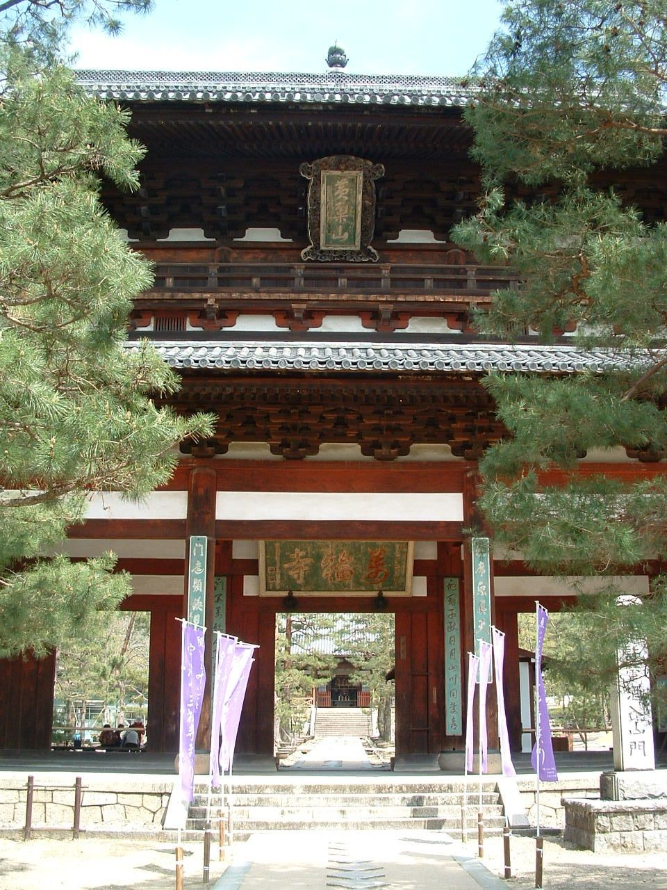 Gate to Mampuku-ji in Uji. Photograph by Gakuro 2004.